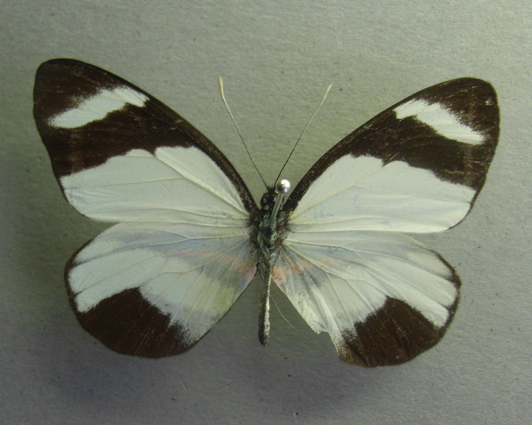 Perrhybris pyrrha Cramer, 1775